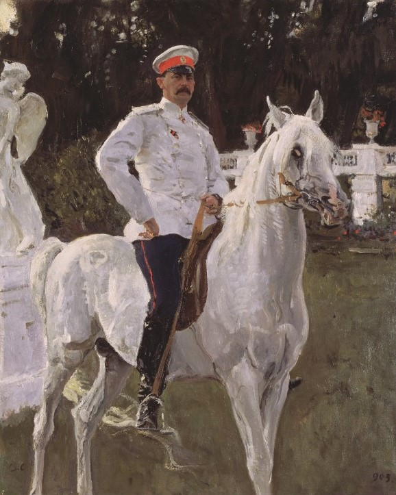 Bildnis Felix Graf Sumarokow-Elston, Fürst Jussupow (1856-1928) (1903) Öl auf Leinwand Staatliches Russisches Museum